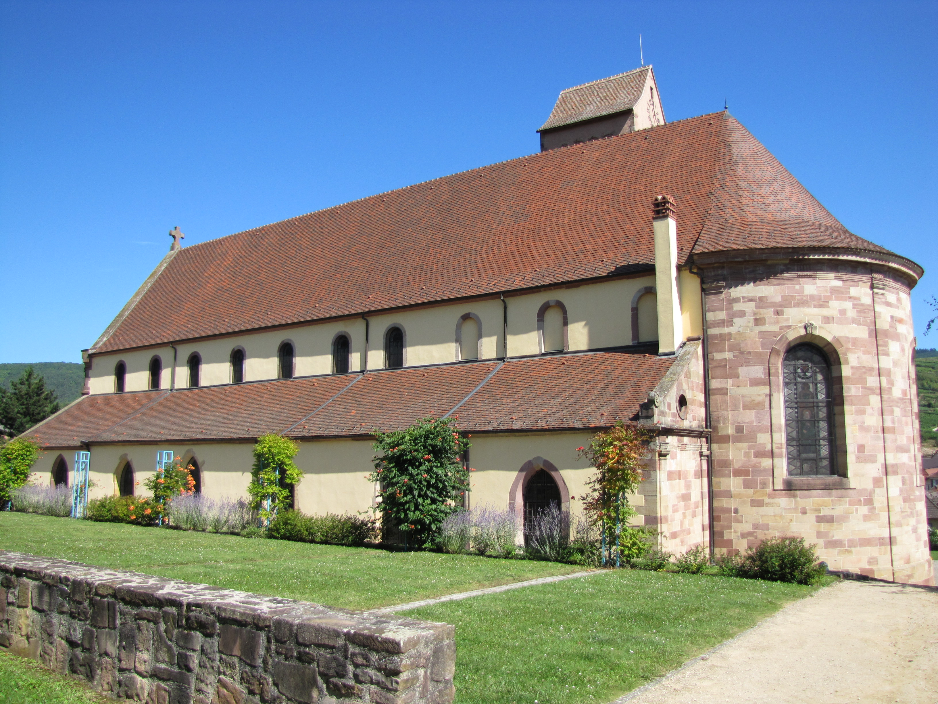 Alsace, Haut-Rhin, Église Saint-Sébastien de Soultzmatt (PA00085689, IA68004357).